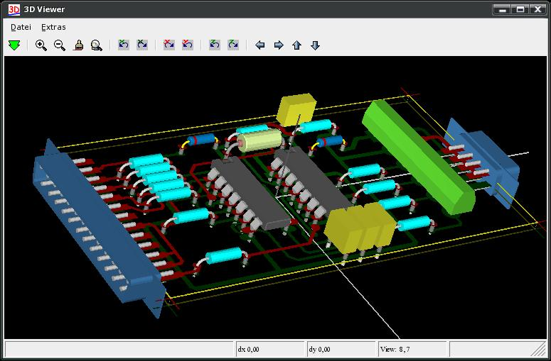 Beispiel der 3D-Ansicht von mit KiCad erstellten Leiterplatten